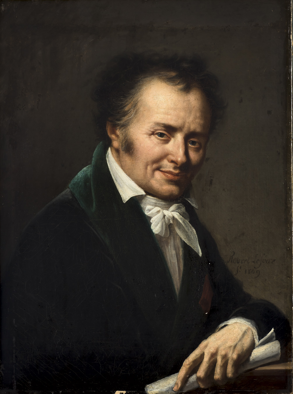 Vivant Denon par Robert Lefèvre (1809)